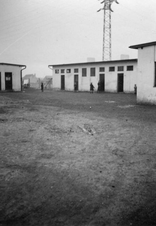 Düsseldorf 37/38